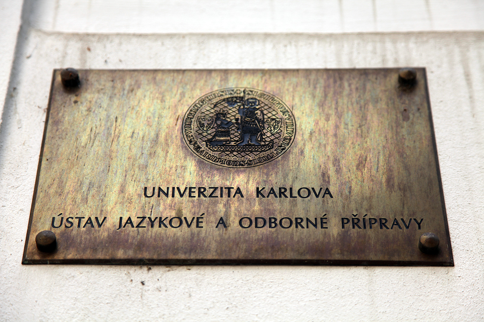 Табличка на здании дирекции Института языковой и профессиональной подготовки Карлова университета в Праге